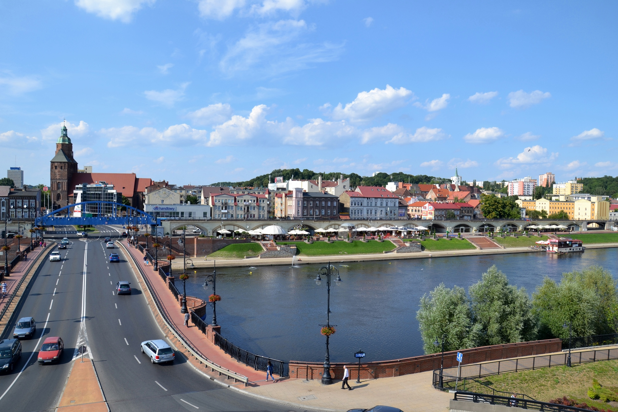 Widok na estakadę kolejową i bulwary w Gorzowie Wielkopolskim z tarasu widokowego